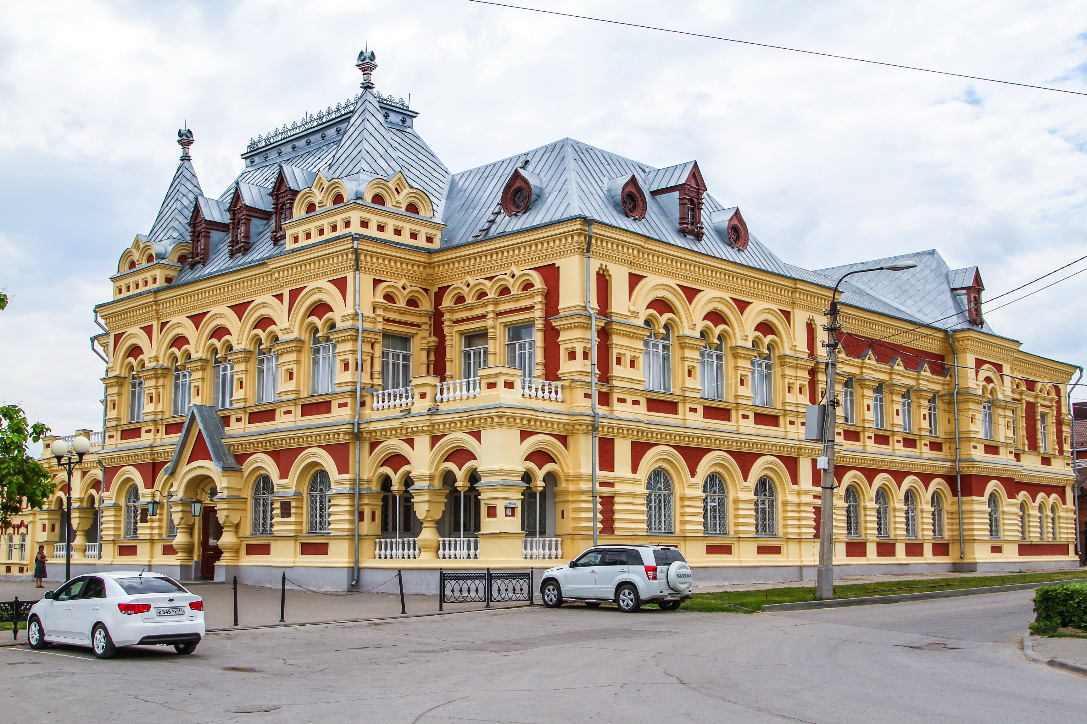 Камышинская уездная земская управа (историко-краеведческий музей)